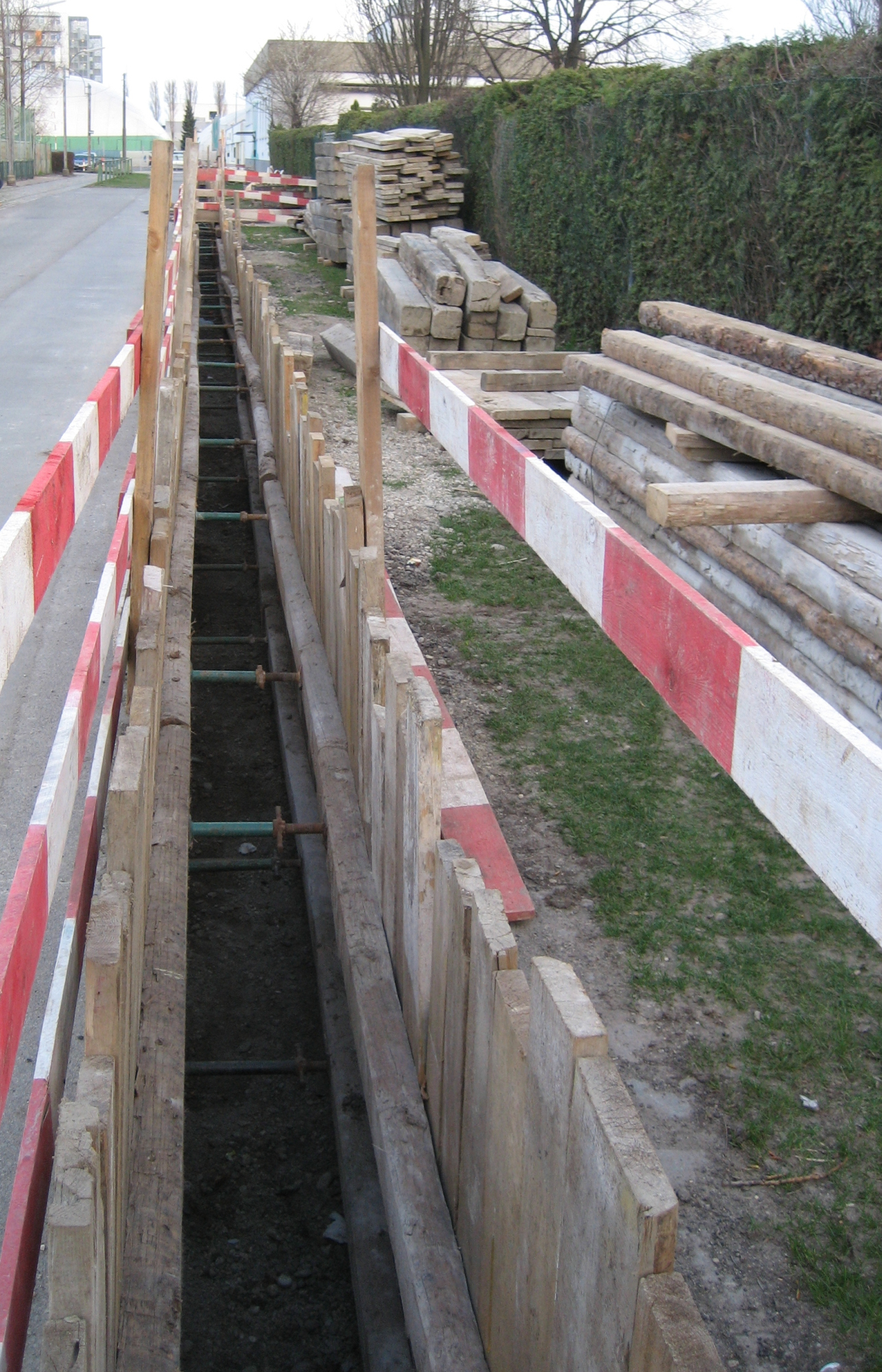 eine Künette für die Verlegung eines Wasserleitungsrohres in Wien